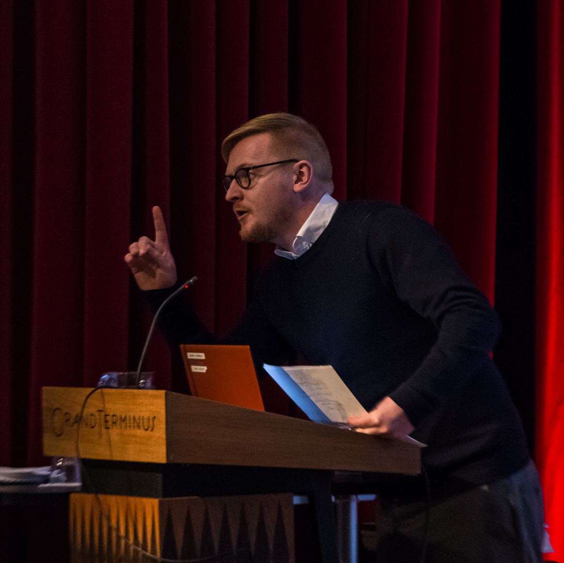 Nødtvedt befaler